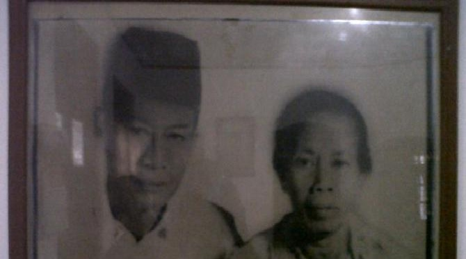 Orang Tua Tole Iskandar